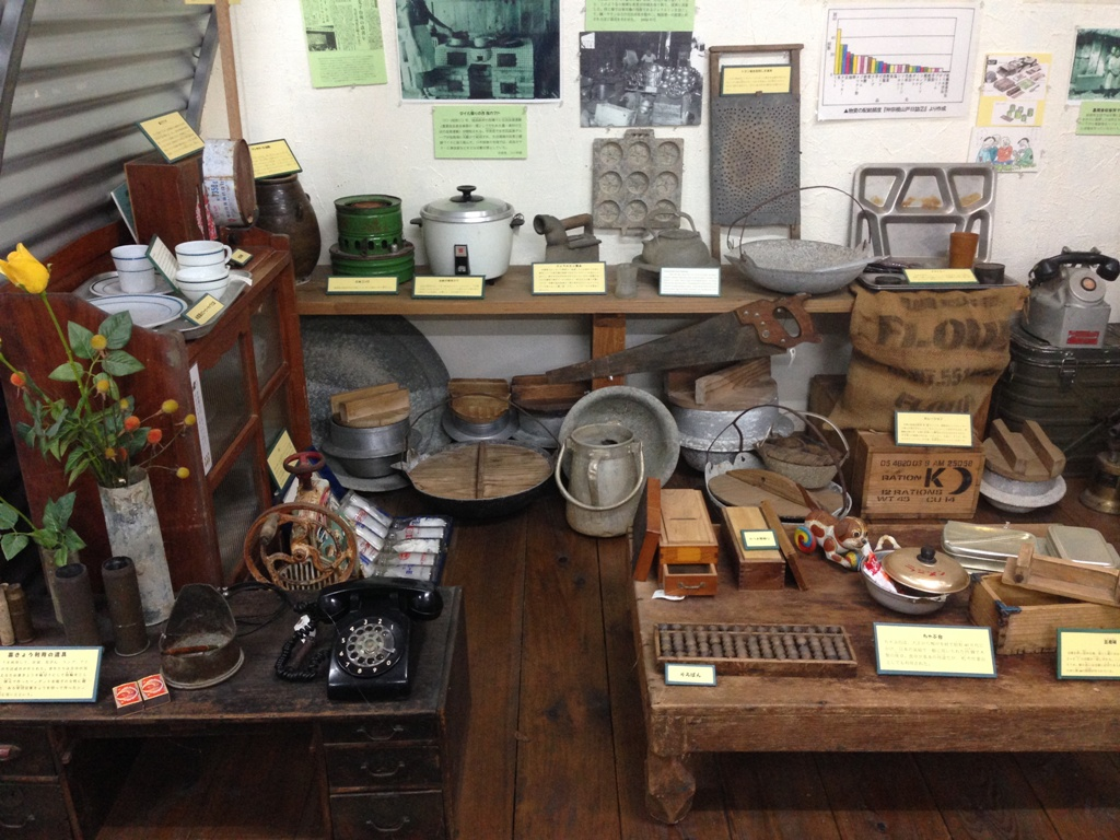 ヒストリートに展示される、戦争直後の生活品